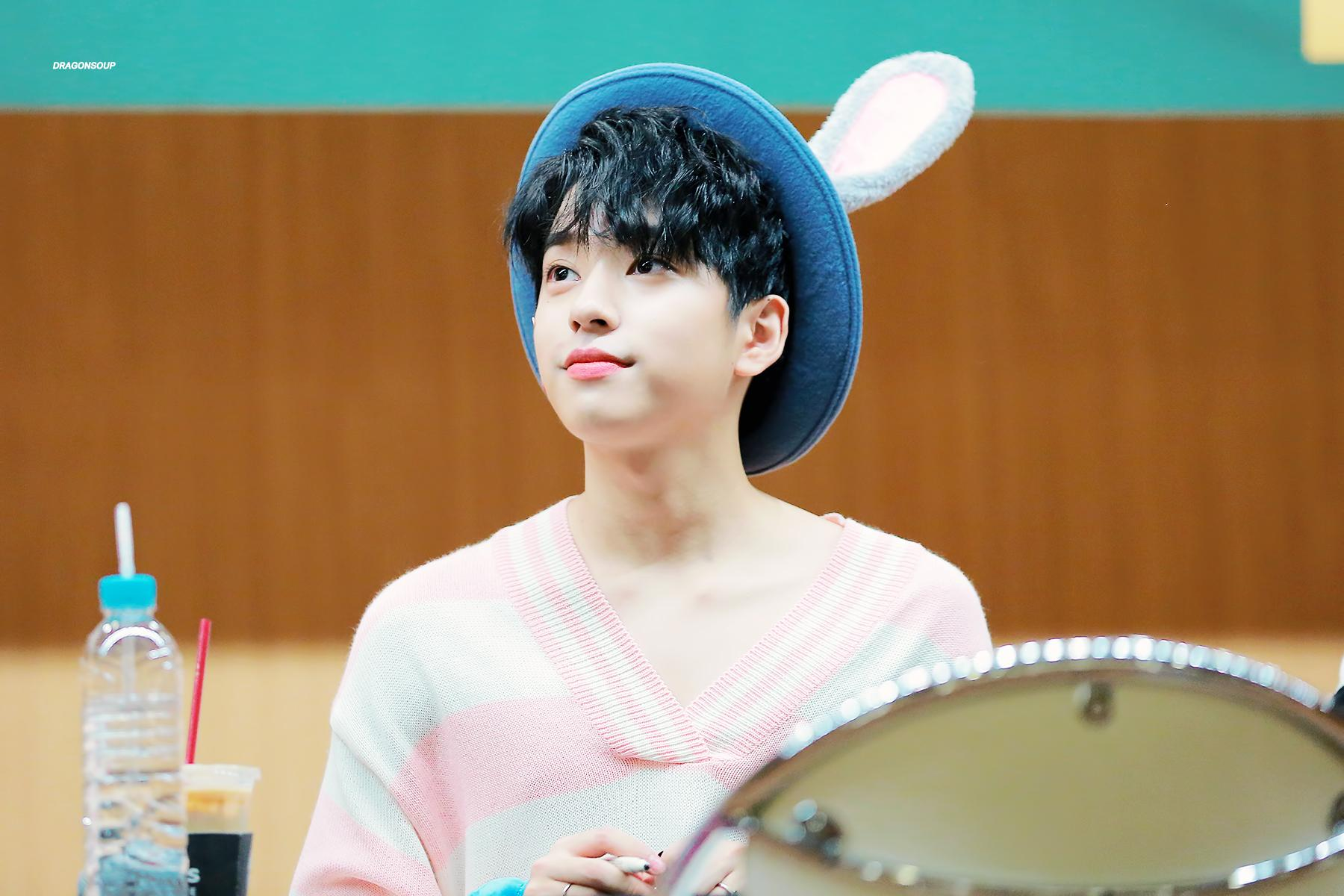 170813 TCC 아트센터